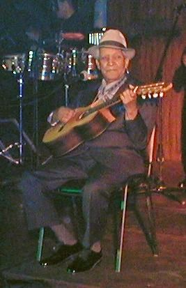 Compay Segundo at Hotel Nacional, Havana, Cuba.